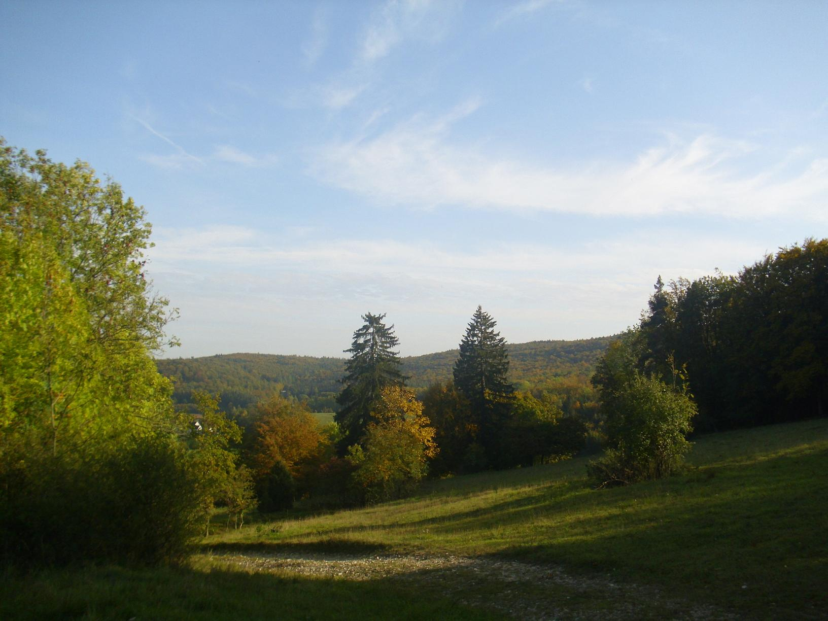 Ohrengipfel bei Nördlingen, Ansicht von Bopfingen-Trochtelfingen